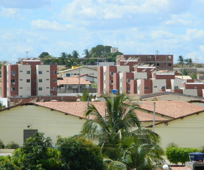 Salgueiro Pernambuco